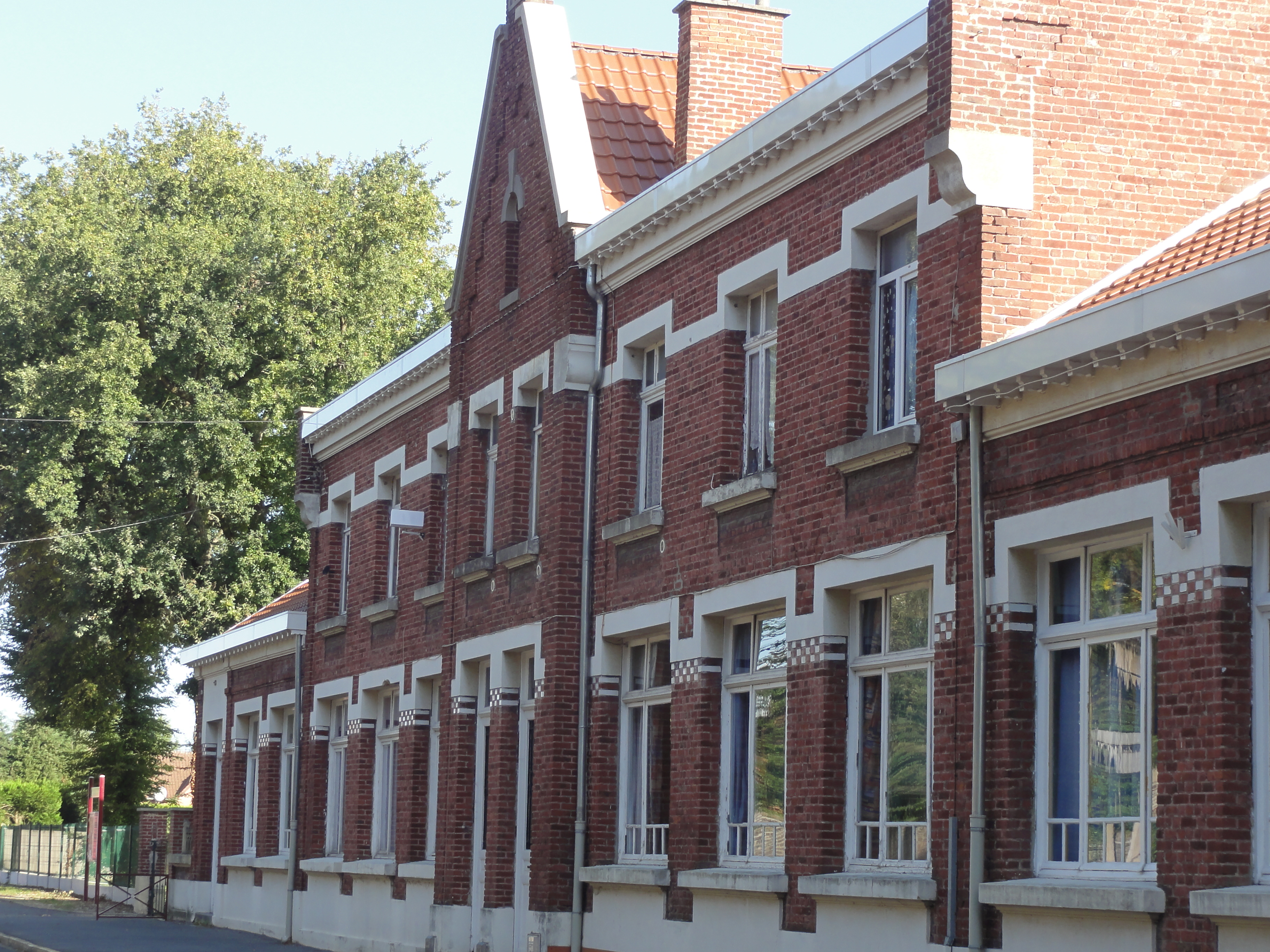 Écoles de la cité d'Arenberg de la fosse Arenberg de la Compagnie des mines d'Anzin, Wallers, Nord, Nord-Pas-de-Calais, France. Les écoles de la cité d'Arenberg sont inscrites sur la liste du patrimoine mondial par l'Unesco le 30 juin 2012 et y constituent en partie le site no 15.